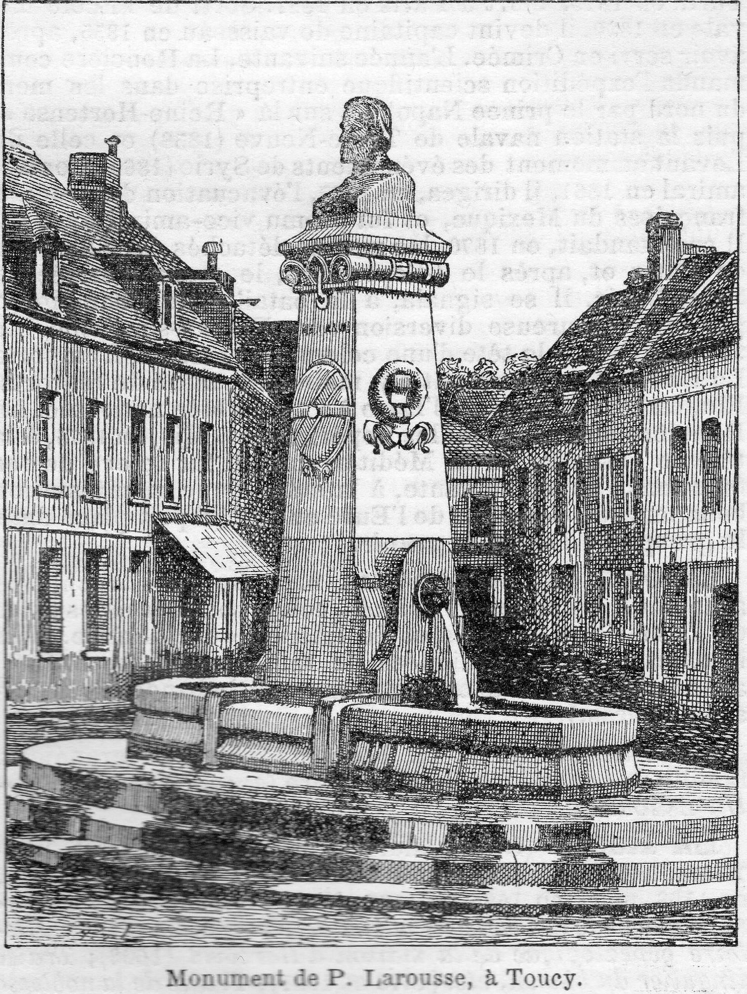 Monument à Pierre Larousse (1817-1875) au centre de la ville de Toucy (France).